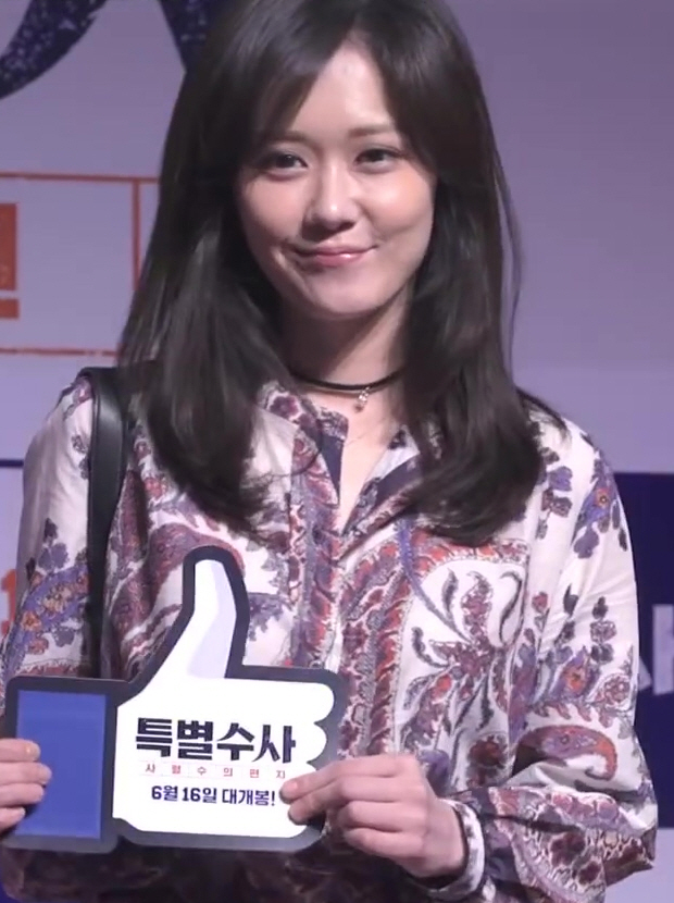 (특별수사 사형수의 편지) 셀럽 엄지척 영상